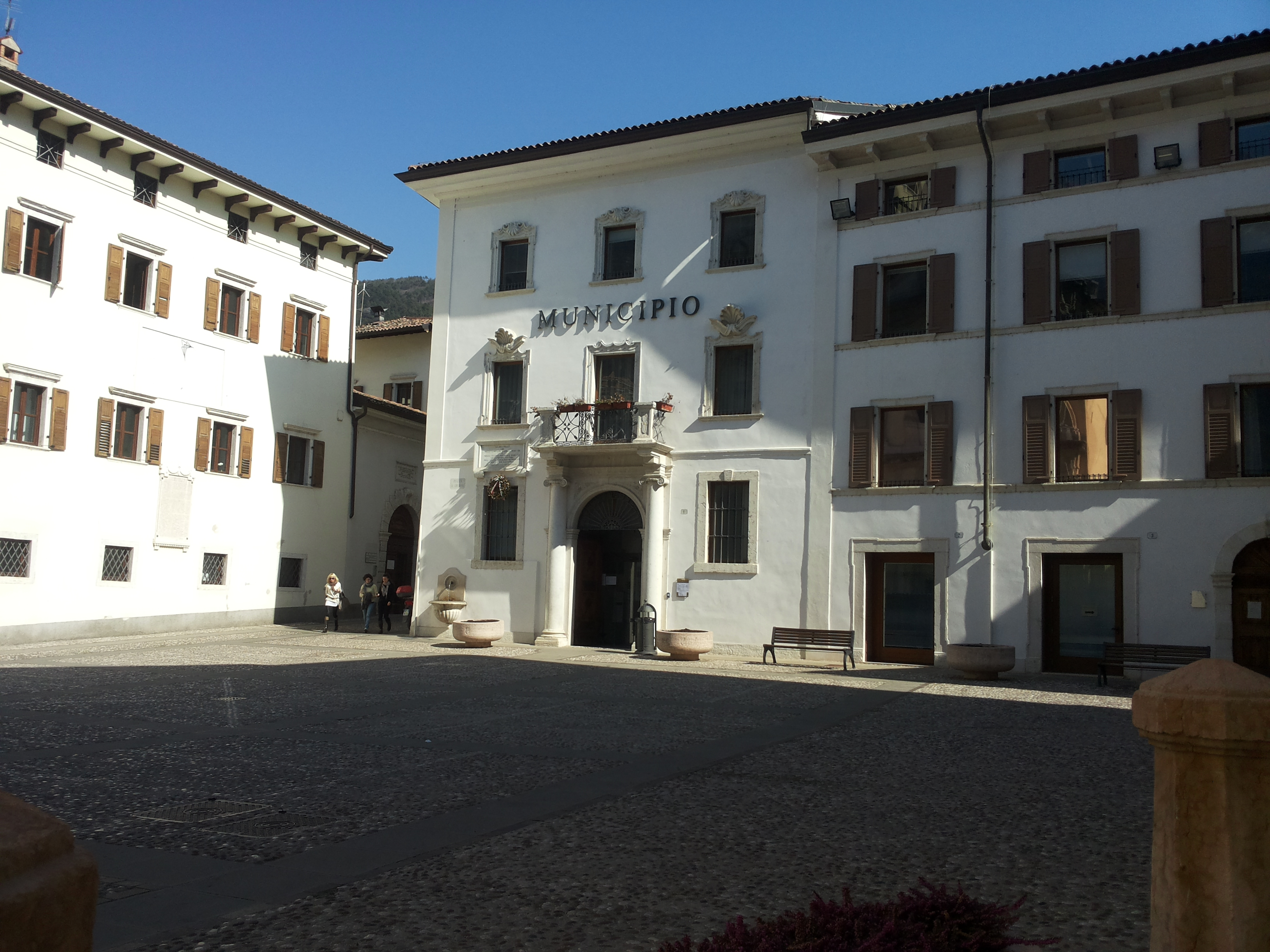 Piazza di Ala (provincia di Trento)